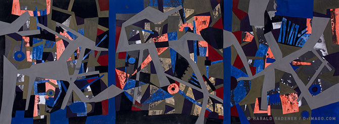 Vorlage für die Metallgewerbl. Berufsschule in Düsseldorf, 1968, Temperafarben auf Pappe, 33,5 x 91,5 cm